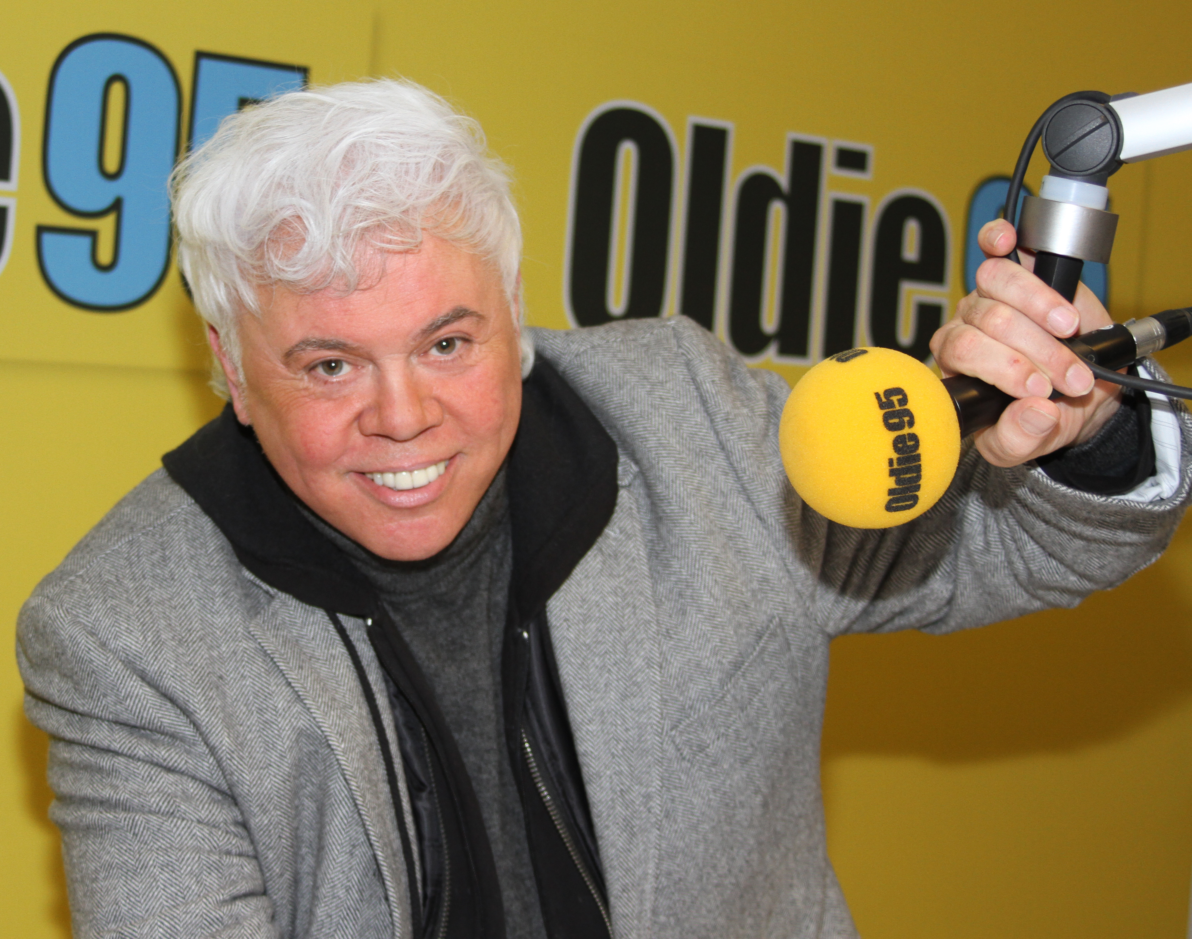 Taco Ockerse (* 21. Juli 1955 in Jakarta) ist ein niederländischer Popsänger, der durch seine Coverversion des Irving Berlin-Hits Puttin’ on the Ritz bekannt geworden ist.